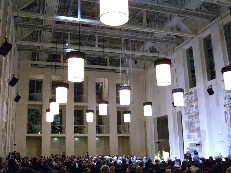 Dresden Hellerau - Festspielhaus Innen